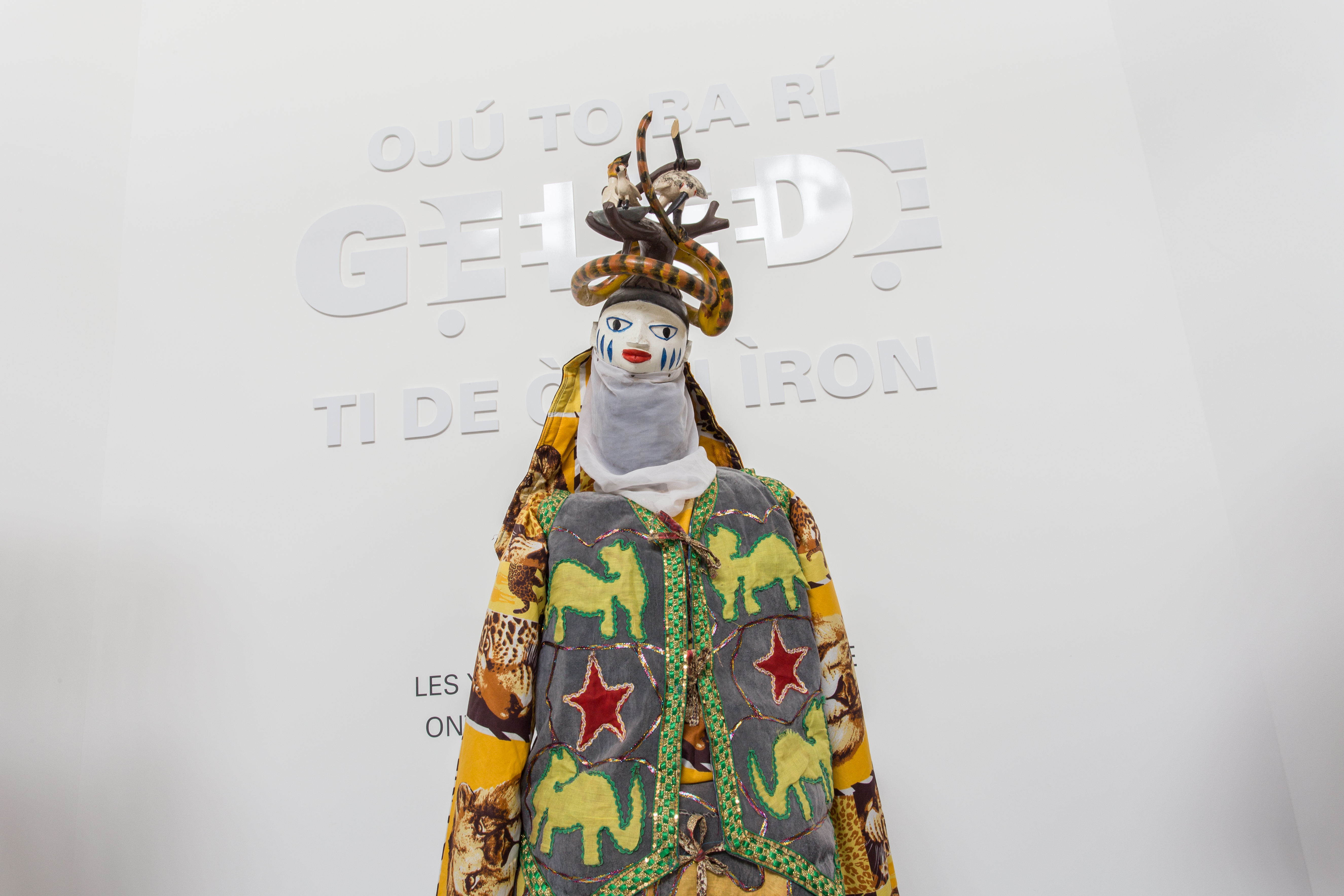 Le Gèlèdé, Gèlèdè, ou Guèlèdé, est une cérémonie pratiquée par la communauté Yoruba-Nago établie dans la région Yoruba-Nago au Bénin, au Nigeria et au Togo. Des chants en langue yoruba, de la musique par quatre tambours et des danses masquées ont lieu à la fin des récoltes, et lors d'événements importants comme certaines naissances, certains décès, et mariages ou en cas de sécheresse ou d'épidémie. Les effets impressionnants de la cérémonie font dire au peuple yoruba que « les yeux qui ont vu le Gèlèdé ont vu le spectacle ultime » (oju to ba ri Gelede, ti de opin iran). « Le patrimoine oral Gèlèdé » a été originellement proclamé en 2001 puis inscrit en 2008 par l'UNESCO sur la liste représentative du patrimoine culturel immatériel de l'humanité. Photo d’une exposition du château Vodou de Strasbourg.